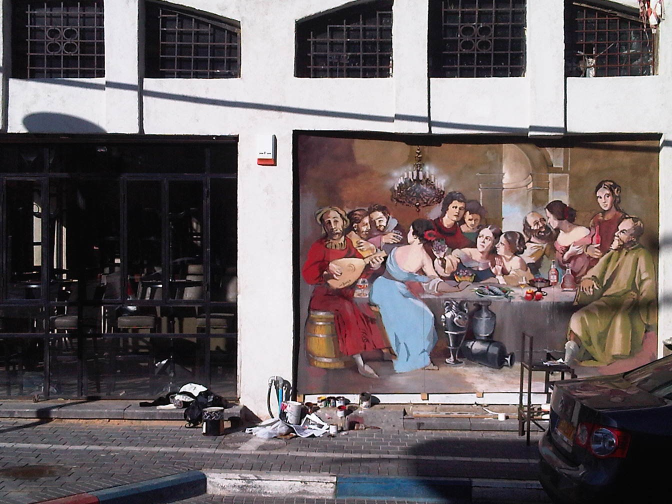 ציור גרפיטי בסגנון בארוק על הקיר החיצוני של מסעדת ג'ופאה בשוק הפישפשים על ידי אמנית אנה קוגן.